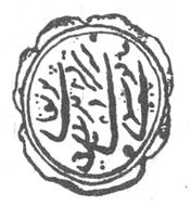 Печатка Задунайського козацького війська з початку ХІХ ст.